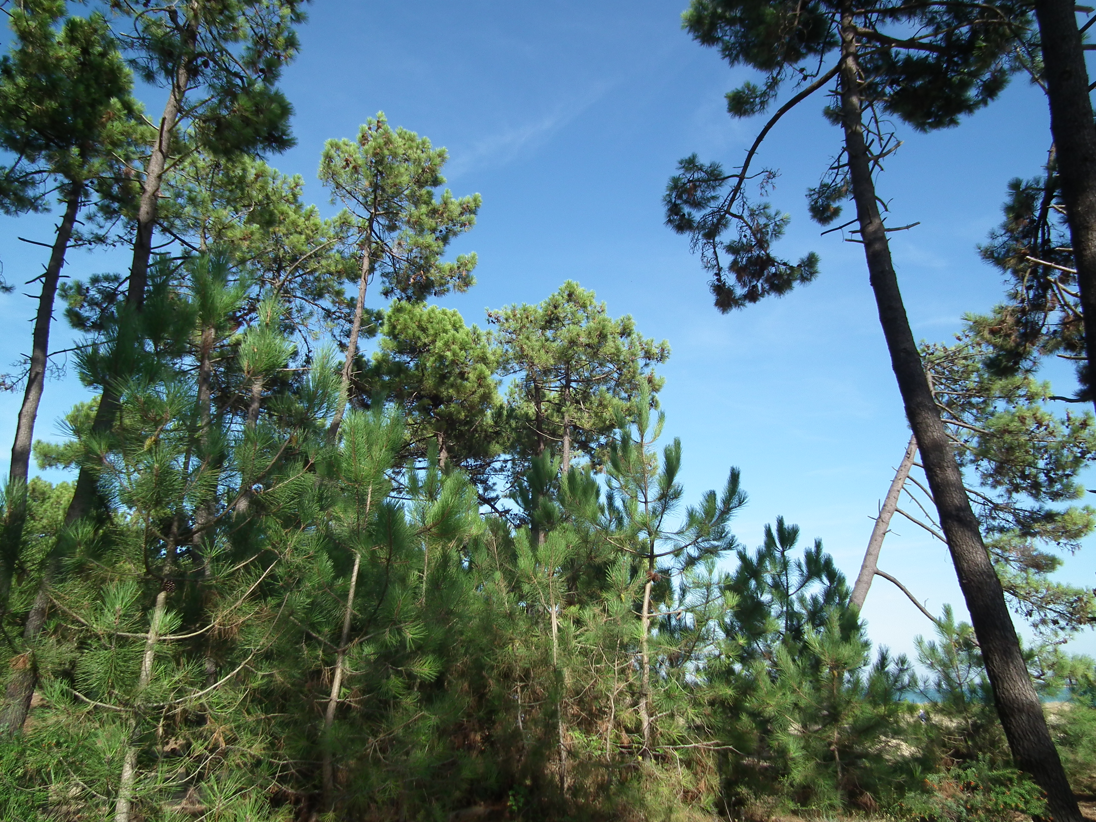 Forêt de Saint-Trojan